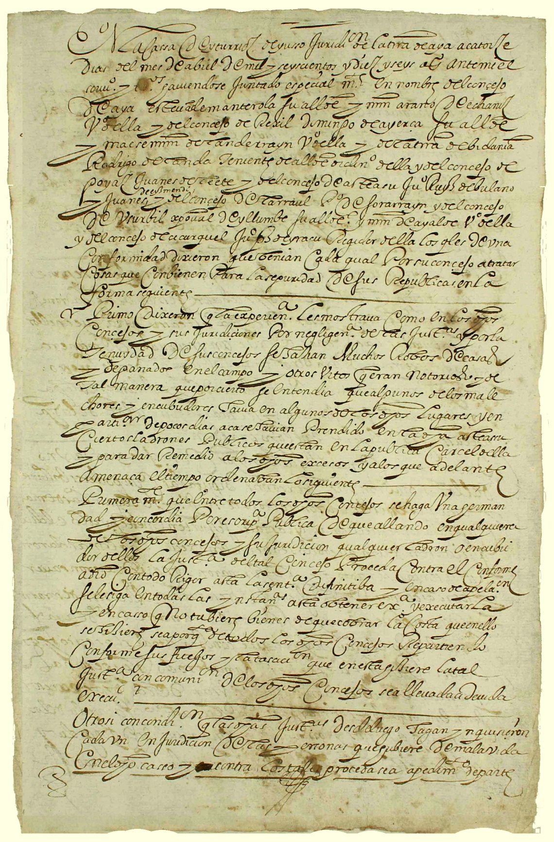 1616an Zizurkil, Aia, Errezil, Bidania, Goiatz, Asteasu, Larraul eta Usurbil elkartu ziren etxe eta abereen lapurrei aurre egiteko.